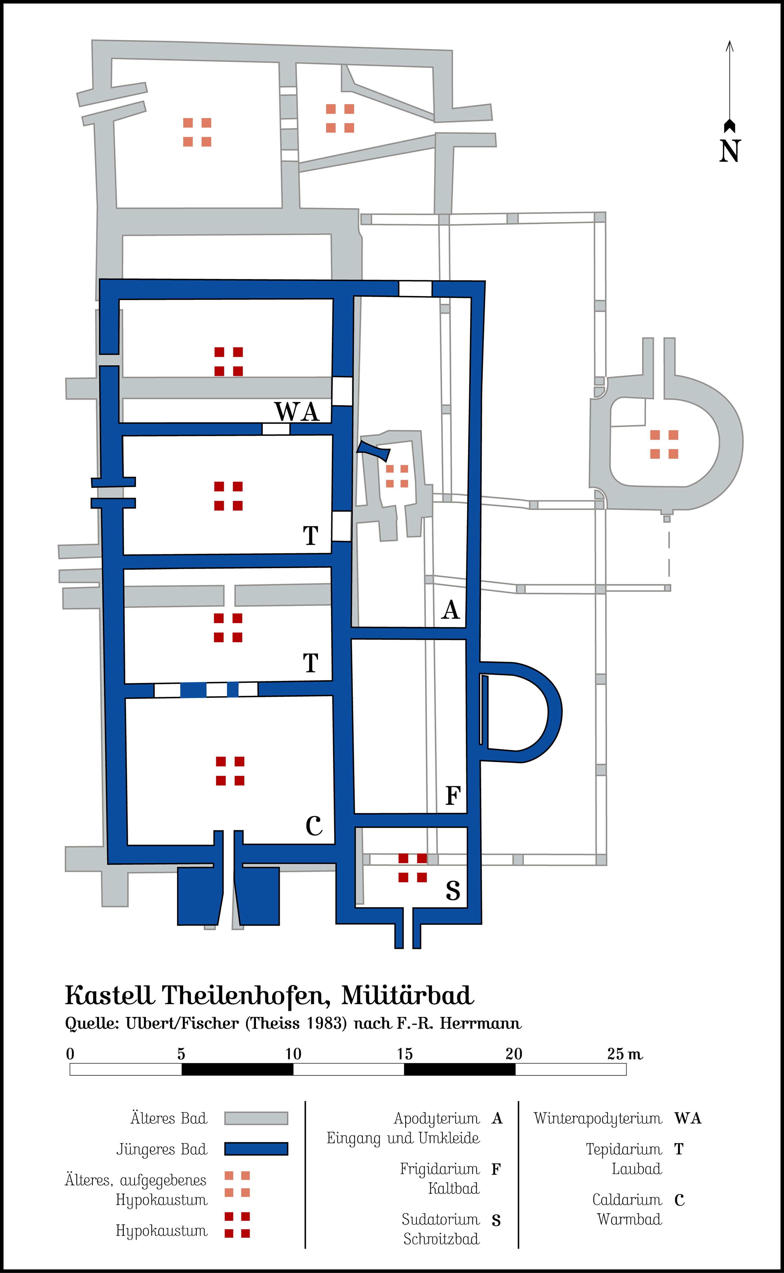 Militärbad des Kastells Theilenhofen. Quelle: Ulbert/Fischer, Theiss 1983